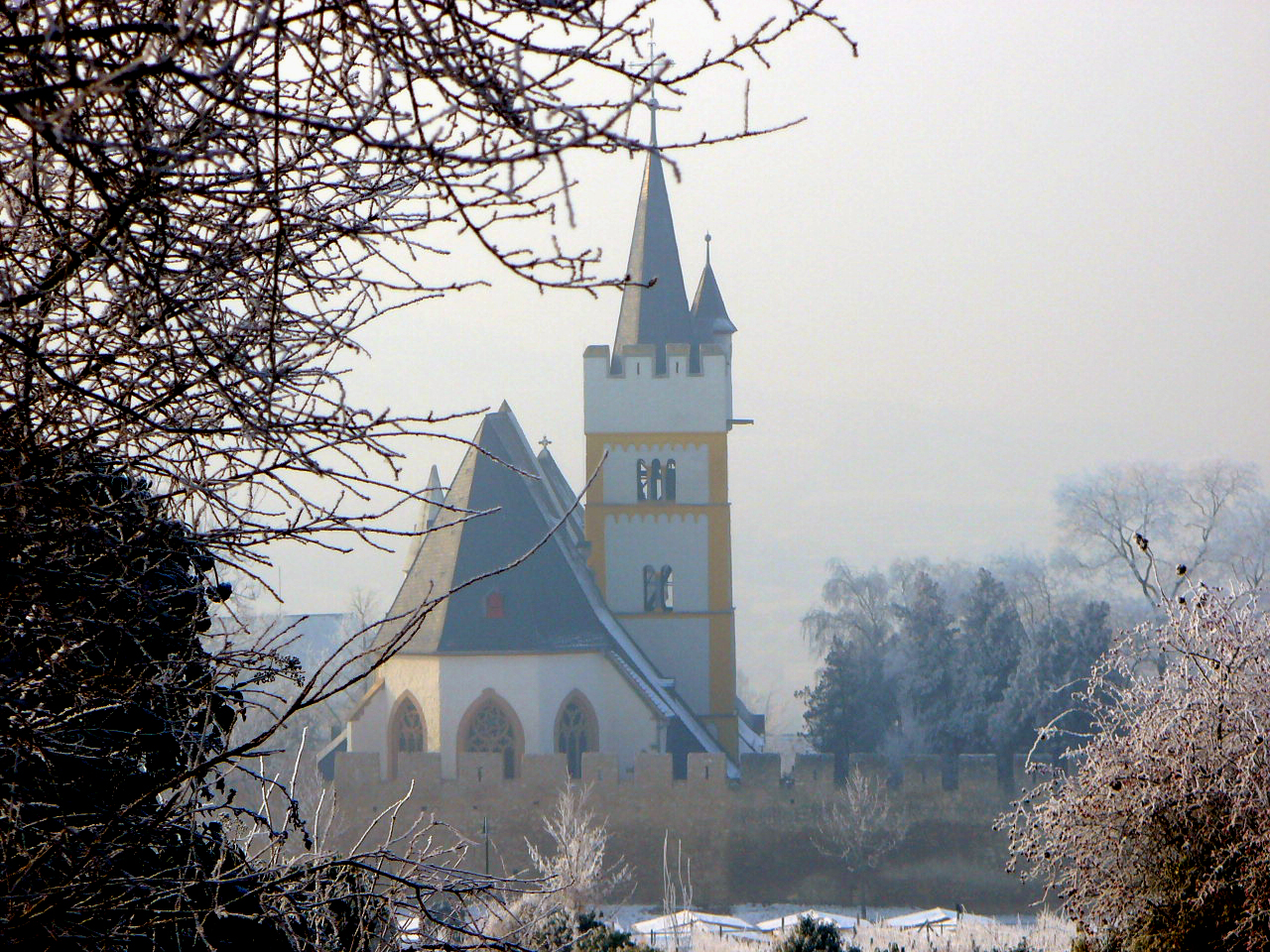 Burgkirche im Januar 2009